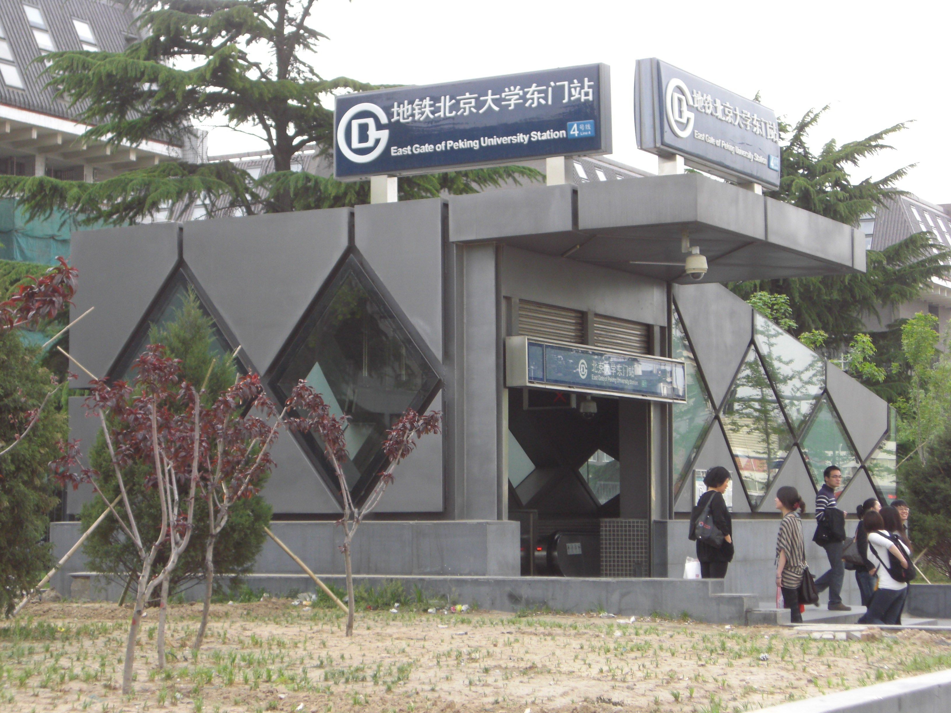 北京大学东门站D口